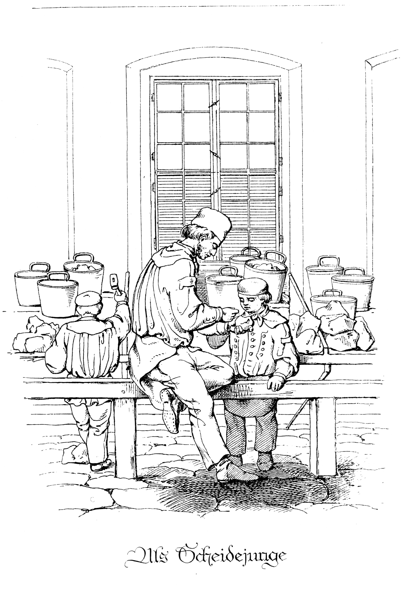 Scheidejunge, Zeichnung v. Eduard Heuchler.